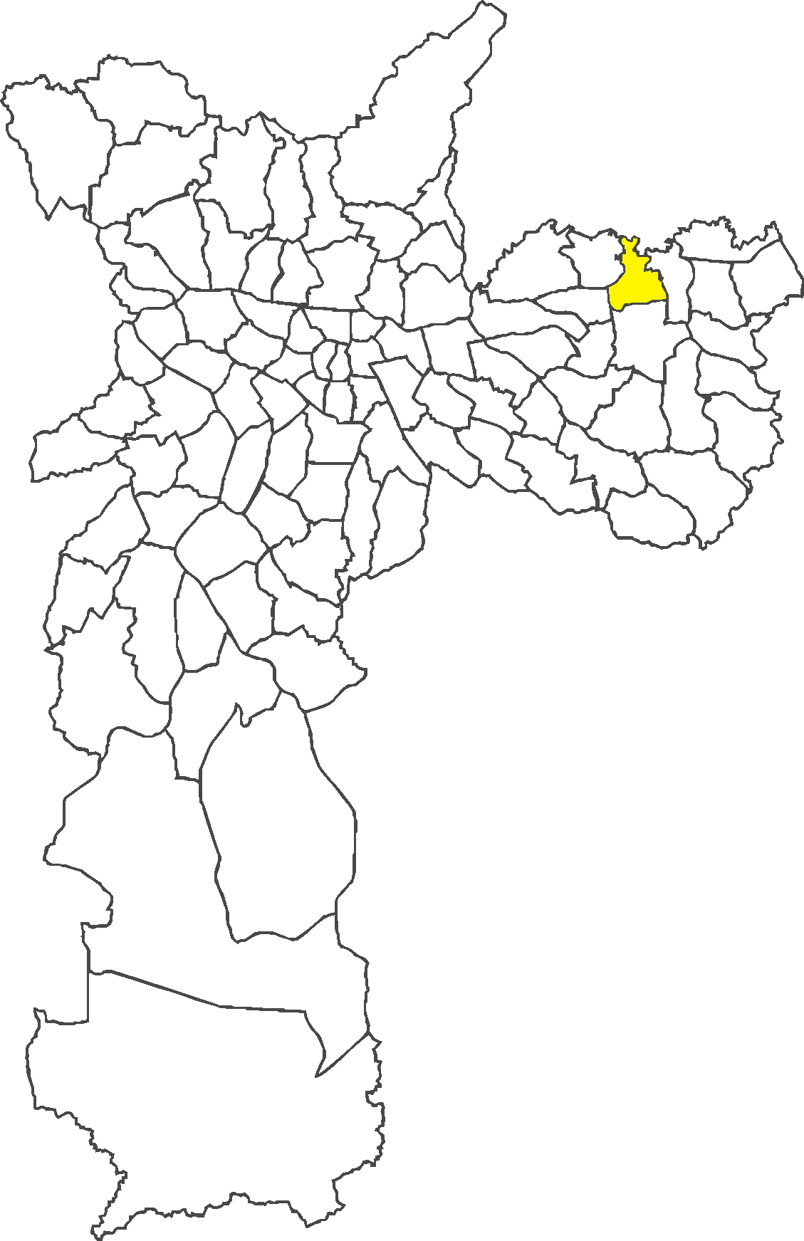 Localização do distrito de Vila Jacuí no município de São Paulo.